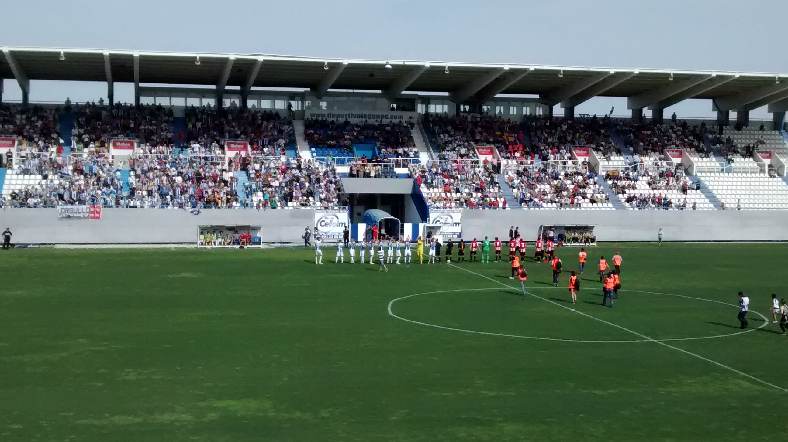 Leganés - Bilbao Ahtletic 2014